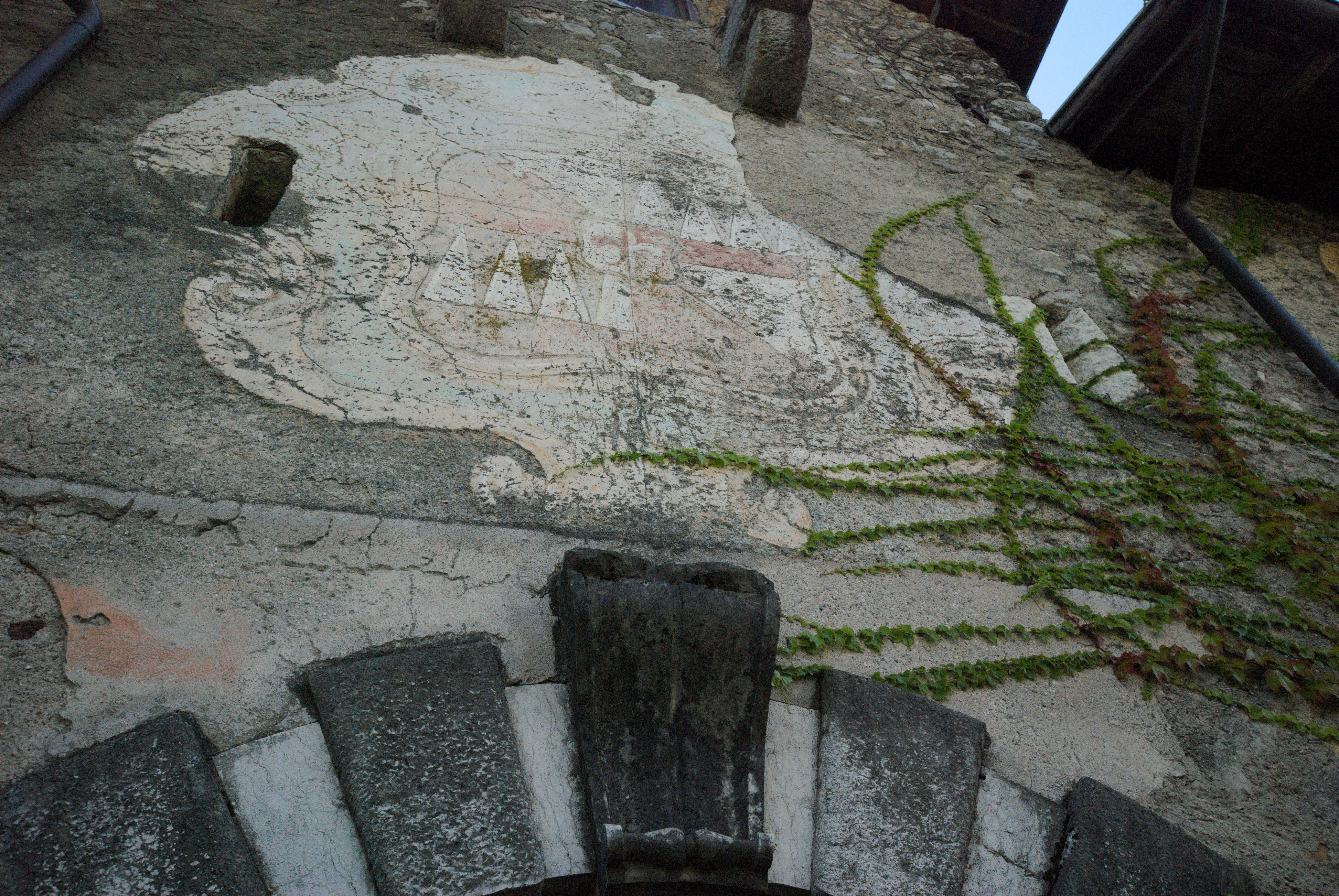 Castel Ivano, stemma portico lato nord. This is a photo of a monument which is part of cultural heritage of Italy.